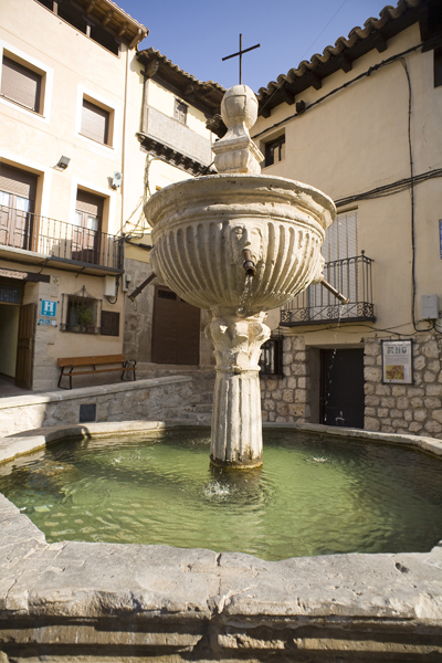 unidentified Spain